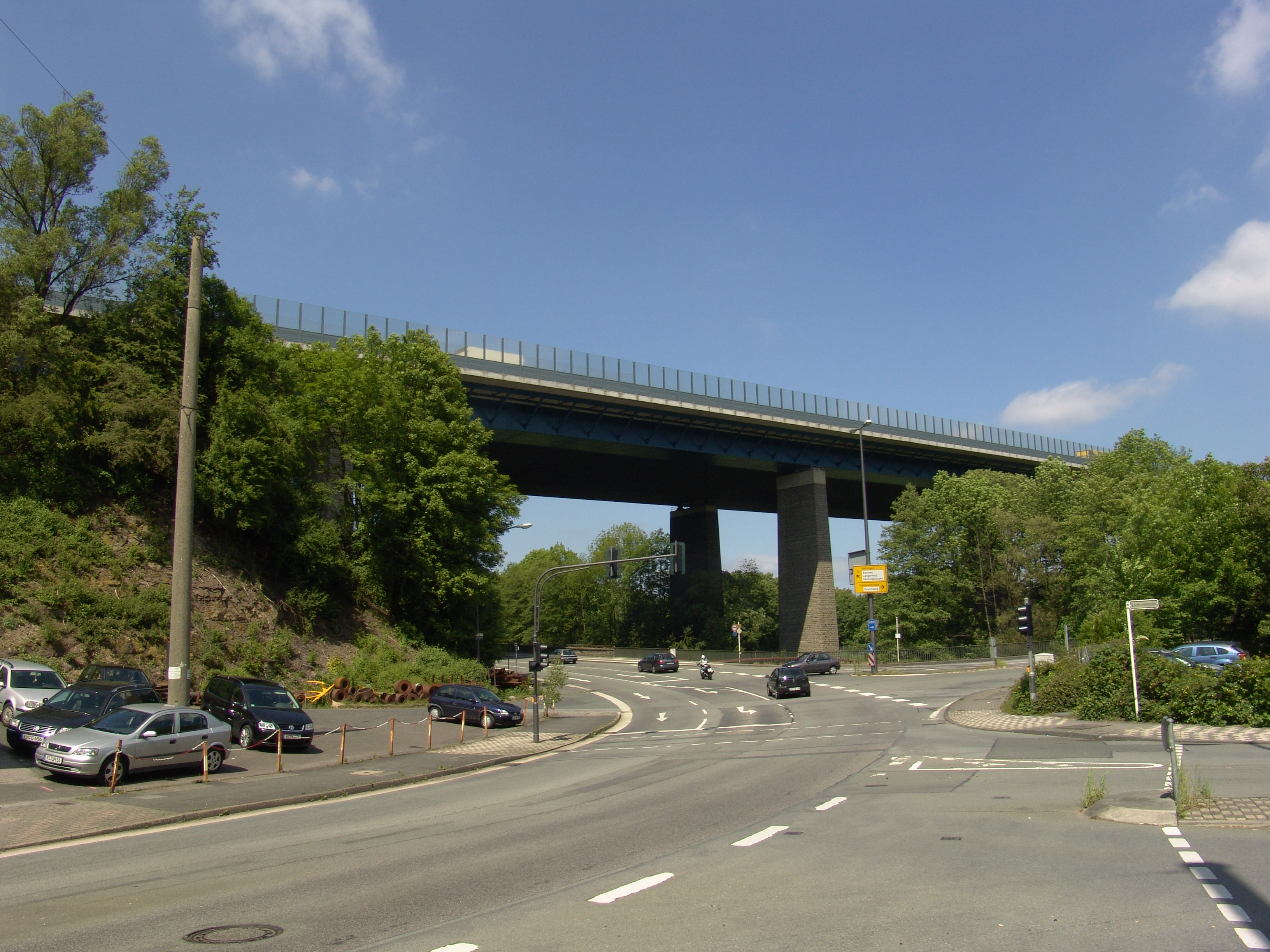 Die Wuppertalbrücke